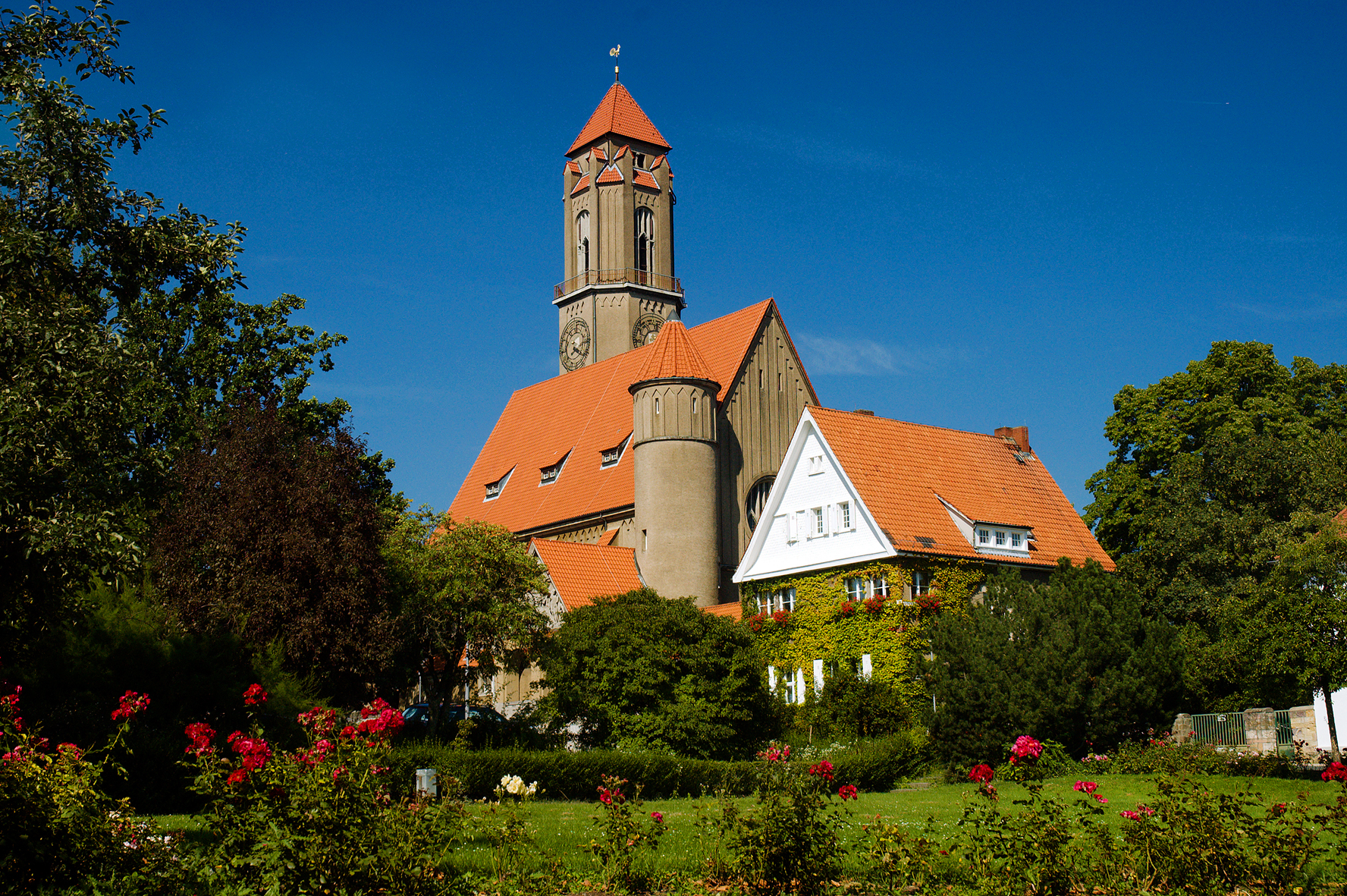 Paulus Kirche; Bessungen